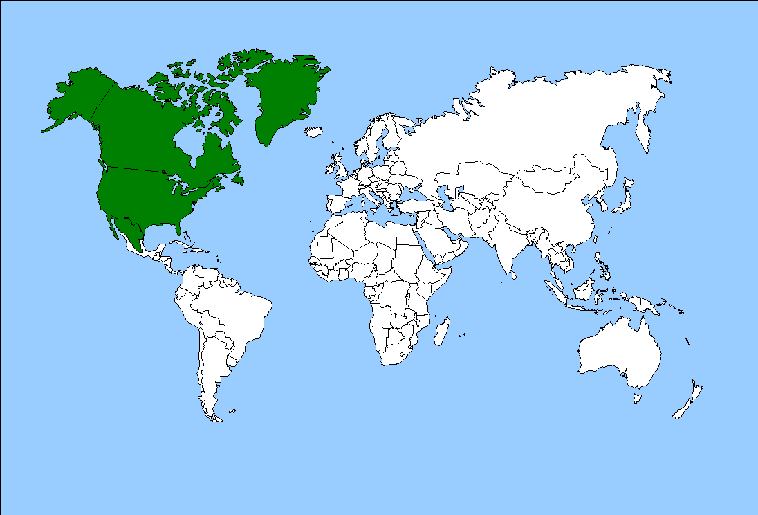 écozone néarctique